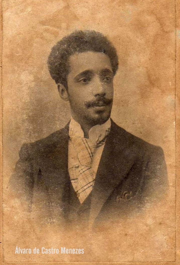 Álvaro de Castro Meneses, século XIX.